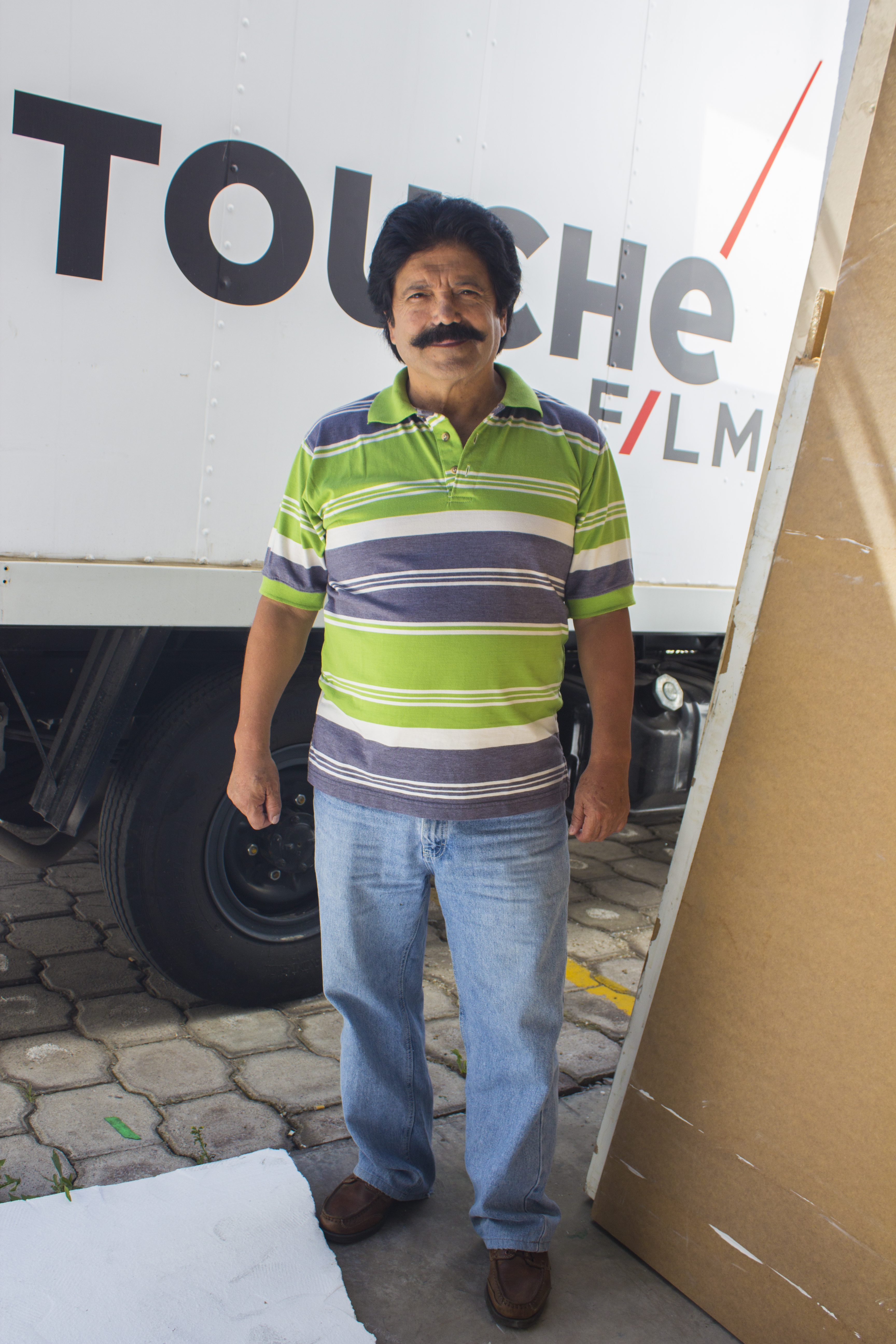 Mosquito Mosquera es un actor de teatro y televisión ecuatoriano, que también a trabajado para TouchéFilms con su producto Enchufe.tv.